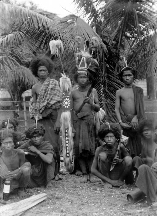 Negatief. Jonge mannen van Solor in krijgskostuum, Oost-Flores